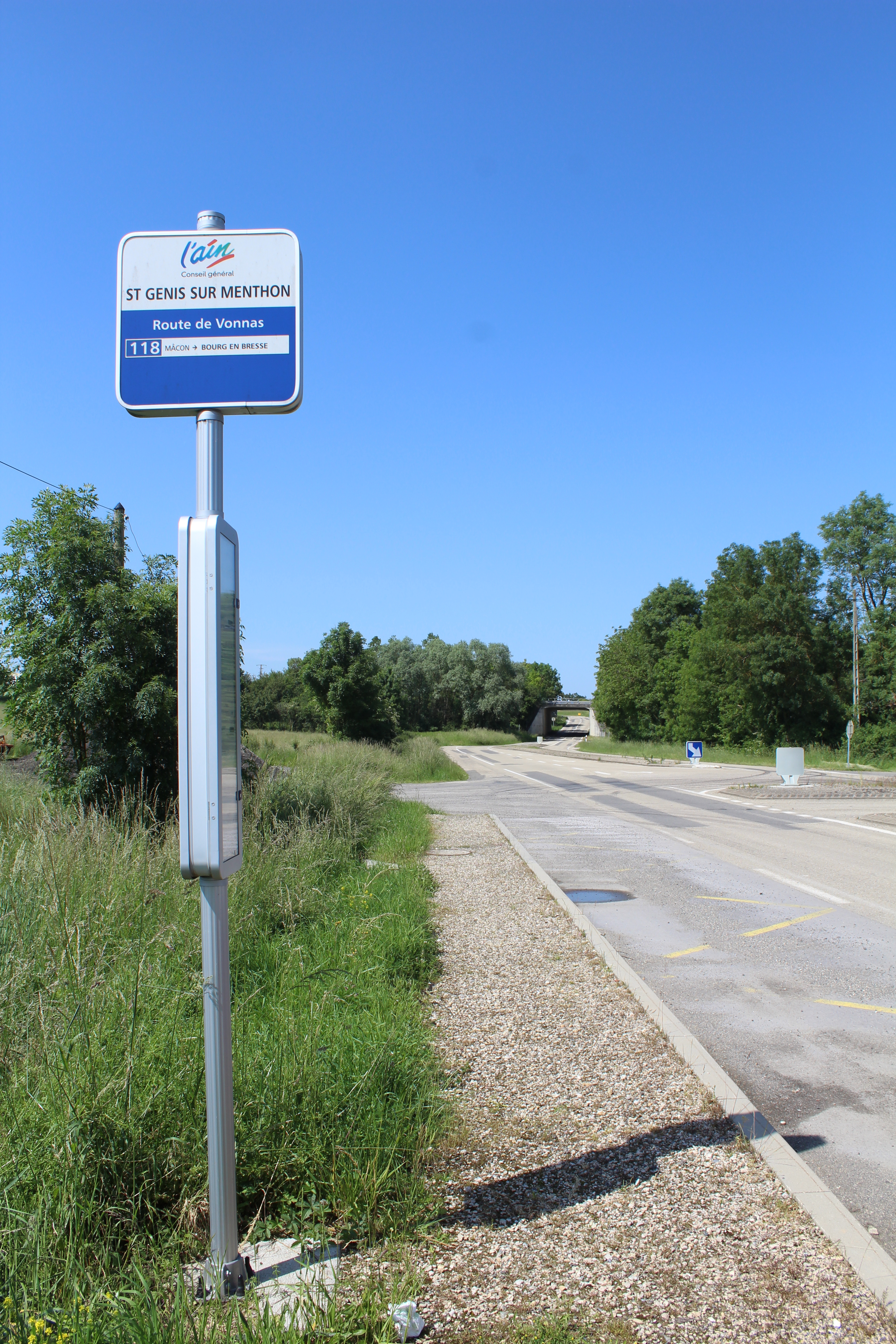 Arrêt Route de Vonnas à Saint-Genis-sur-Menthon le long de la route départementale D47.